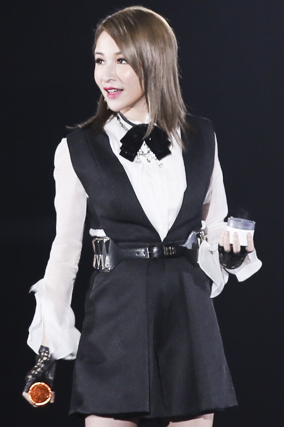 先生力量演唱会 -萧亚轩